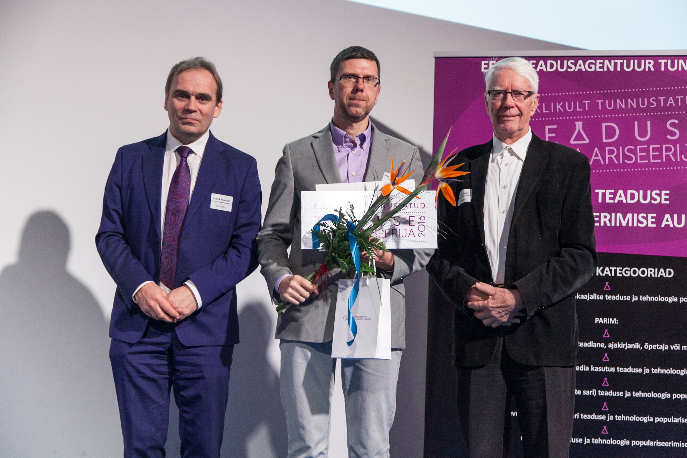 Veljo Runnel 2016. aasta teaduskommunikatsiooni konverentsil võtmas vastu teaduse populariseerimise auhinda